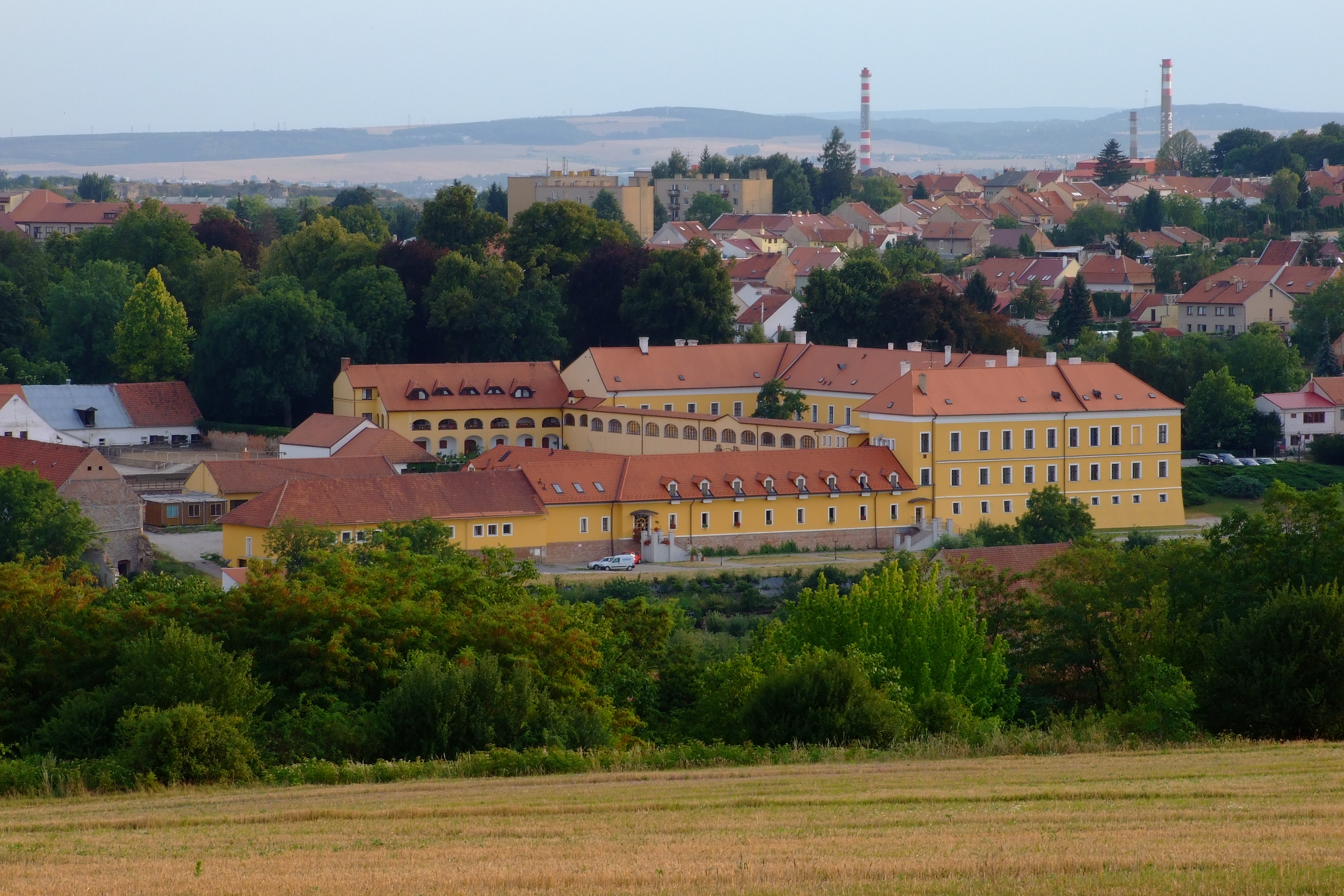 Brno-Líšeň - Líšeňský zámek ve Staré Líšni focený od Kostelíčku